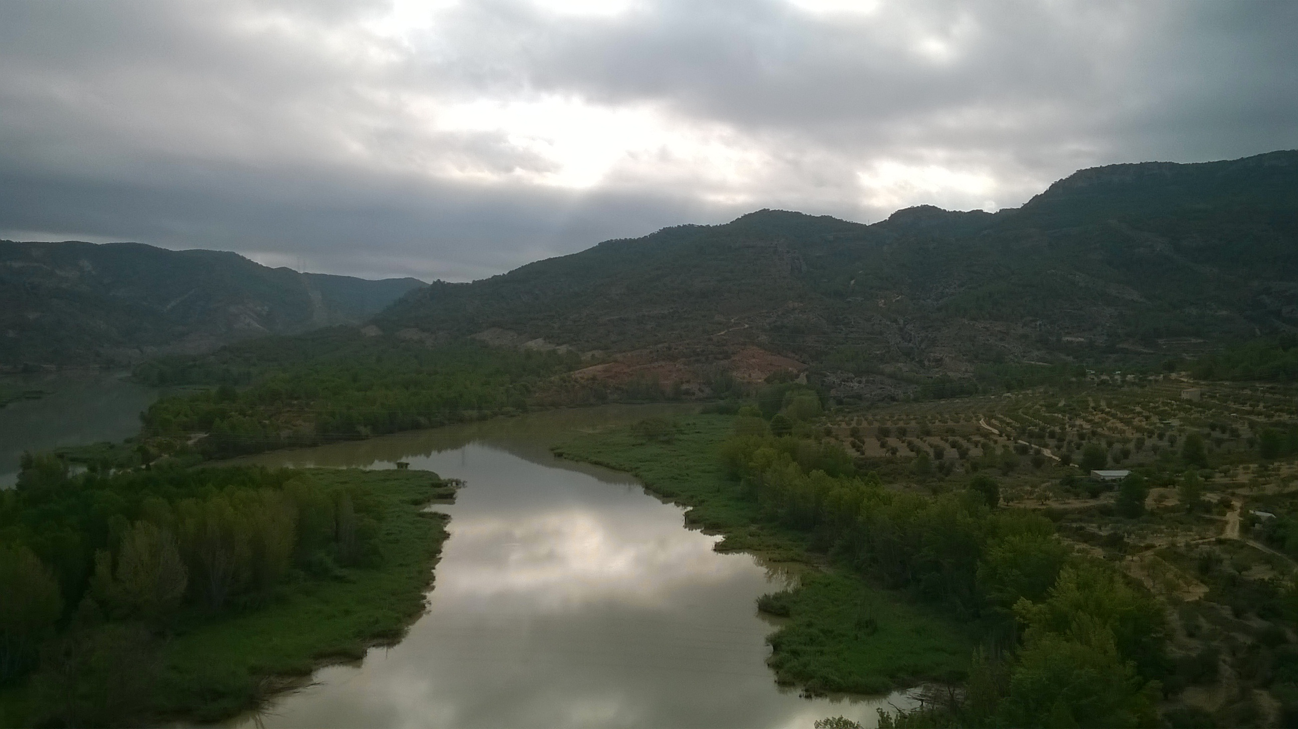 Cebuano: Cofrentes